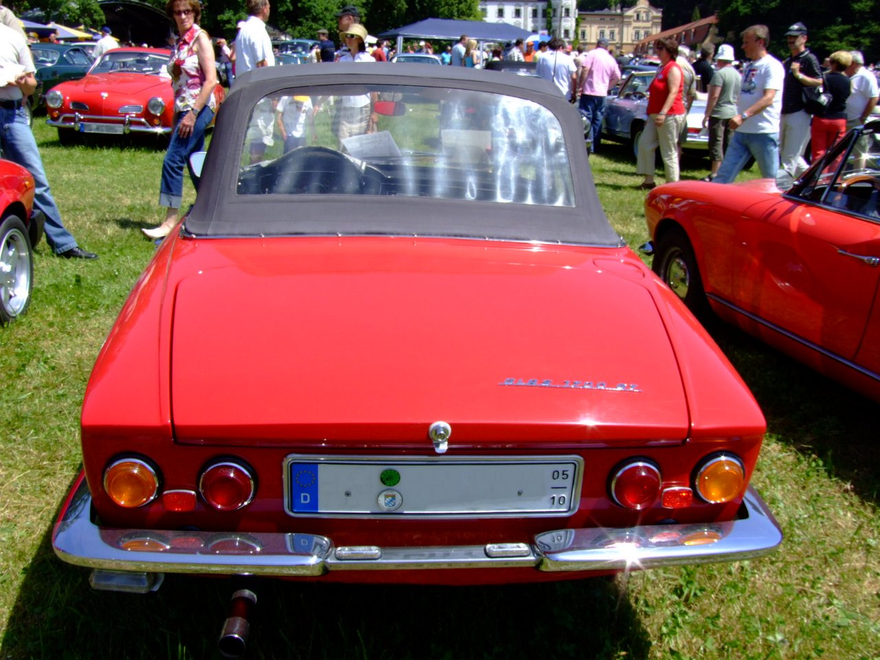 Glas 1700GT 1965 Baujahr: 1965 85 PS 4 Zylinder 1281 ccm 175 km/h